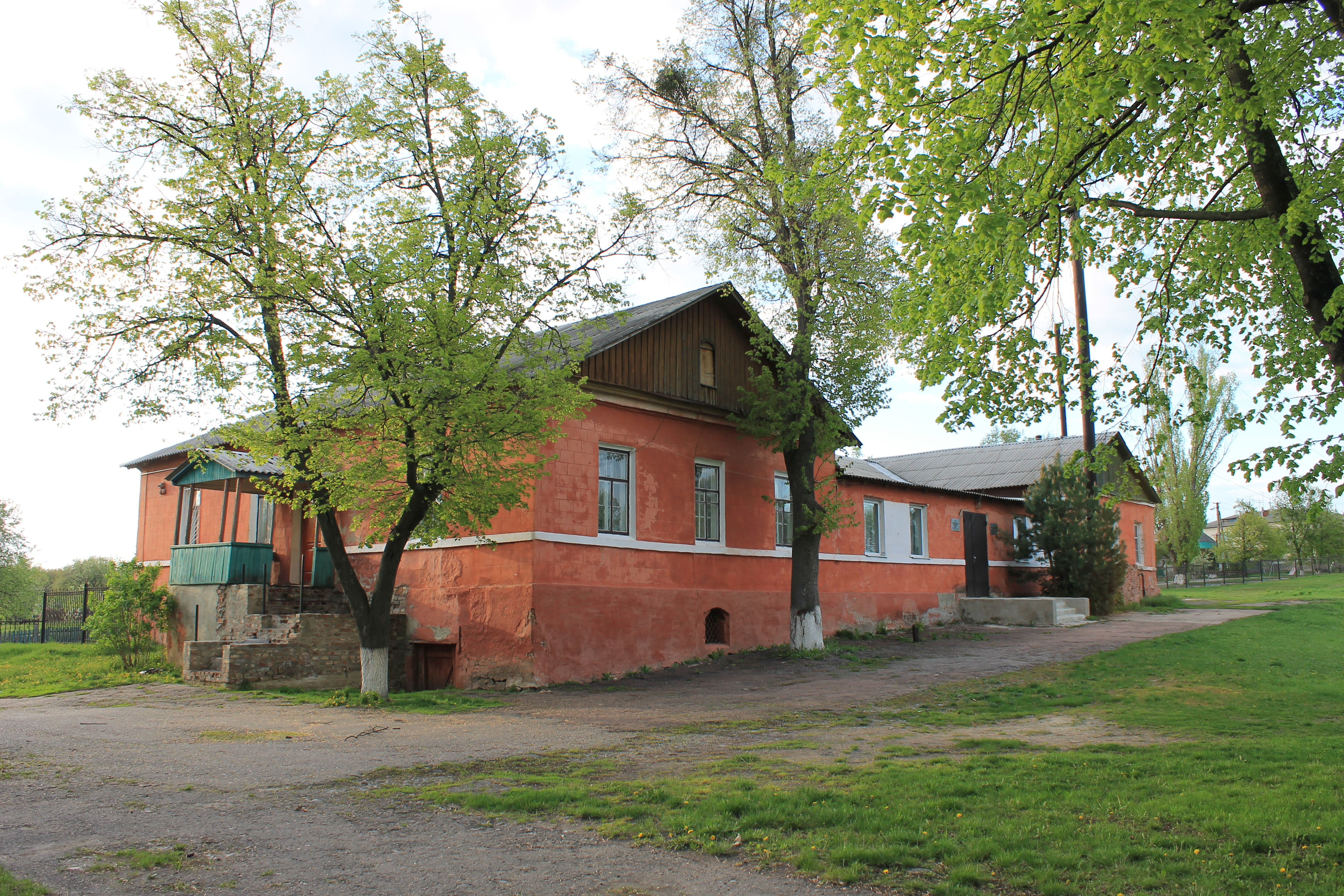 Садибний будинок — Контора управляючого (сучасне використання — клуб, фондове та службове приміщення музею, бібліотека, котельня), вул. Приозерна, 3, с.Сковородинівка, Золочівський р-н., Харківська обл.